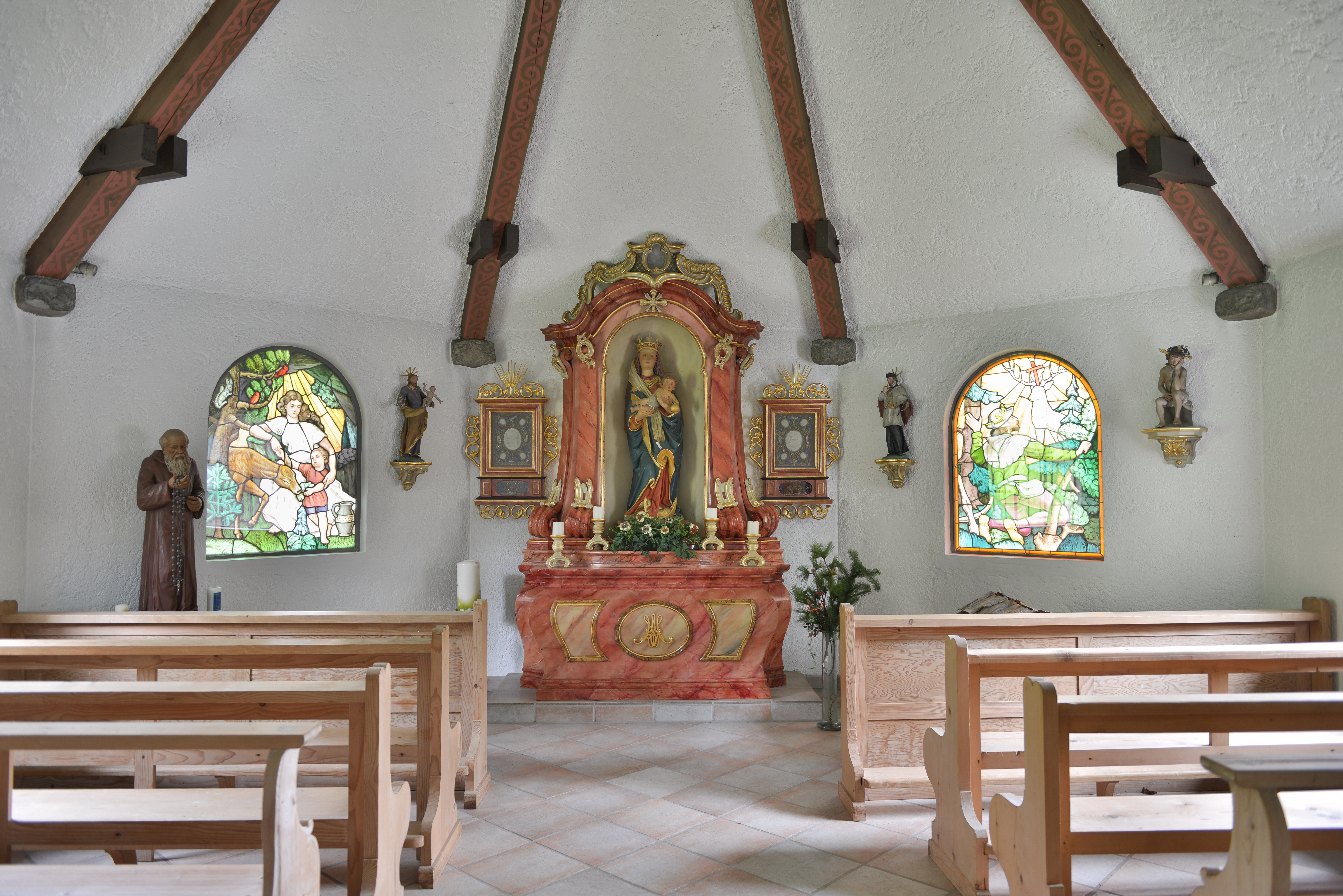 Mariahilfkapelle (Leidtobelkapelle) in Mittelberg-Hirschegg, Kleinwalsertal.